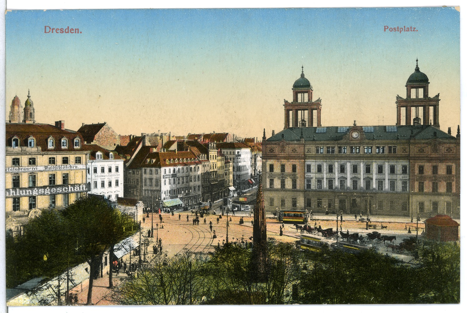 Dresden; Postplatz This postcard is from publisher Brück & Sohn in Meißen ( This postcard has a unique number 12685 and is available in a higher resolution at the publisher. This images was uploaded in a cooperation project between Wikipedians and the publisher.